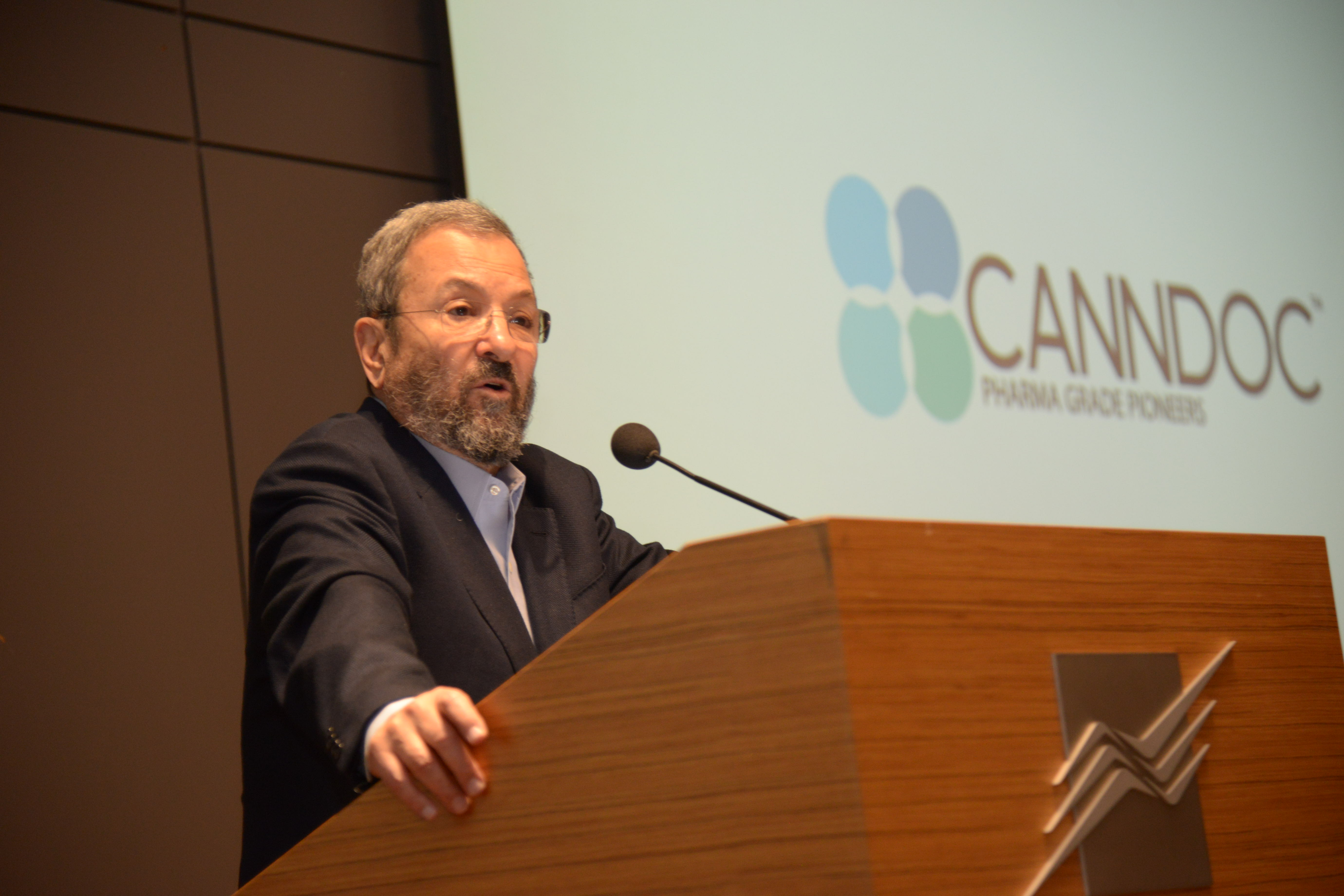 אהוד ברק קנדוק